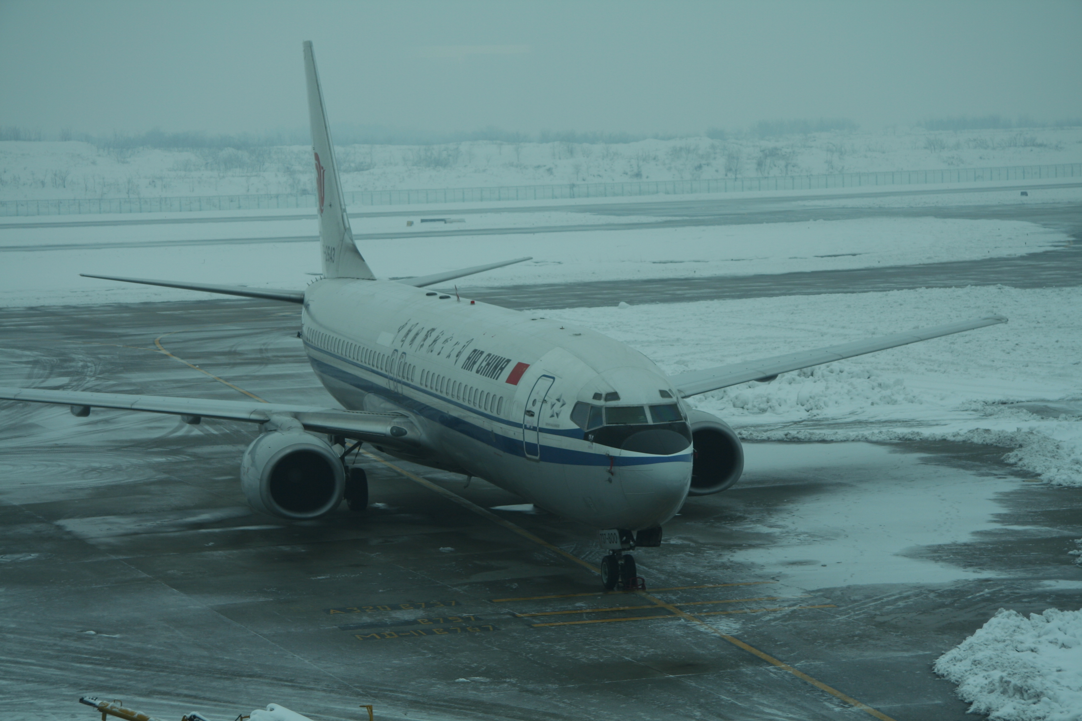 An Air China Boeing 737-800